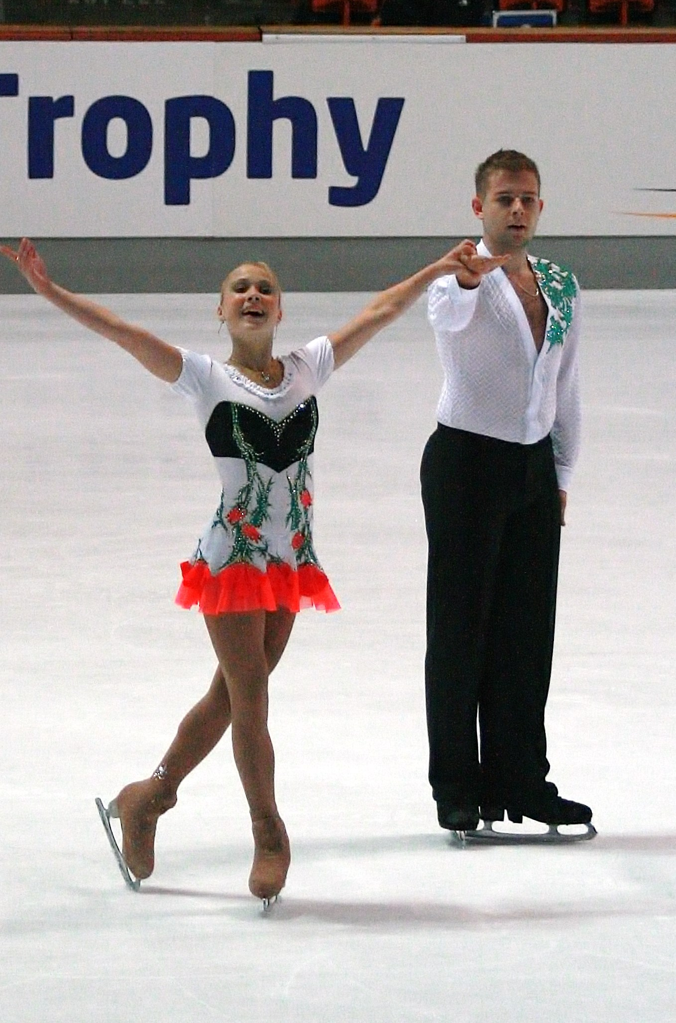 Мария Полякова и Никита Бочков (Белоруссия) на 2013 Nebelhorn Trophy